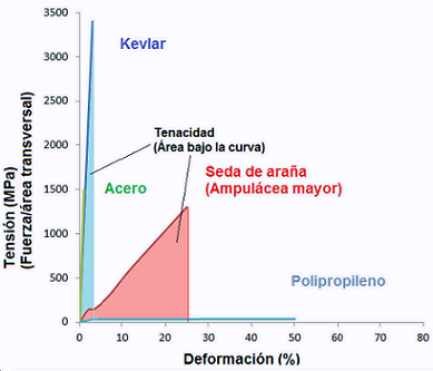 Curvas representativas de Tensión-Deformación de la seda de araña (Ampulácea Mayor) en comparativa con las de otros materiales ingenieriles